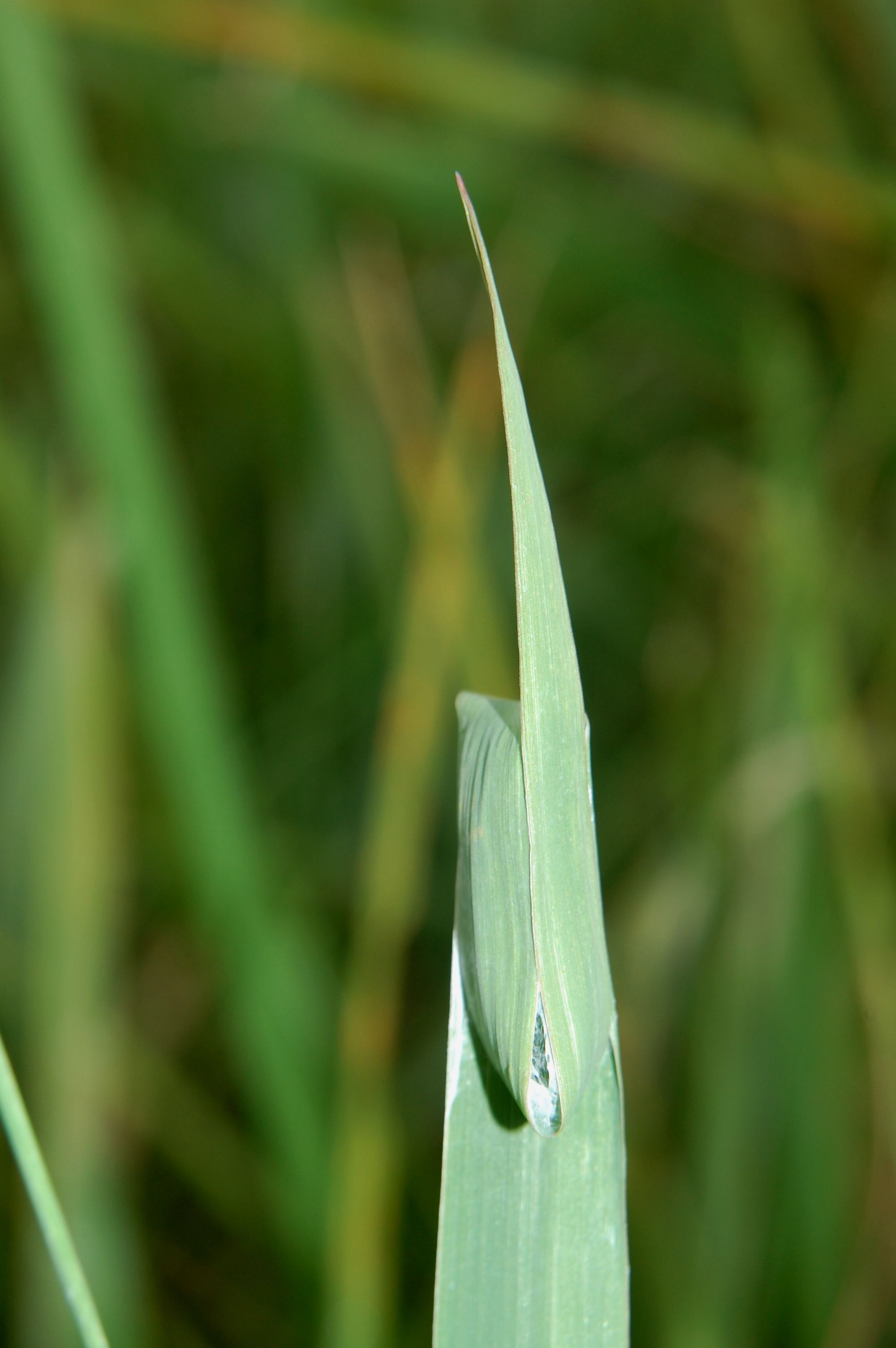 Clubiona stagnatilis, Wohngespinst in geknicktem Grashalm. Tiefwerder, Berlin-Spandau